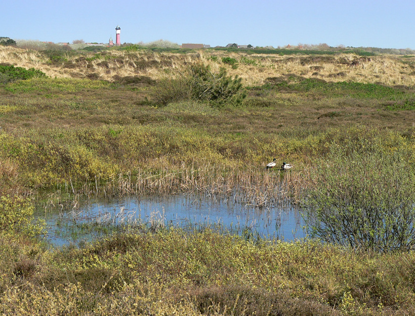 Wangerooge mit Klein-Biotop wassergefülltem Bombentrichter